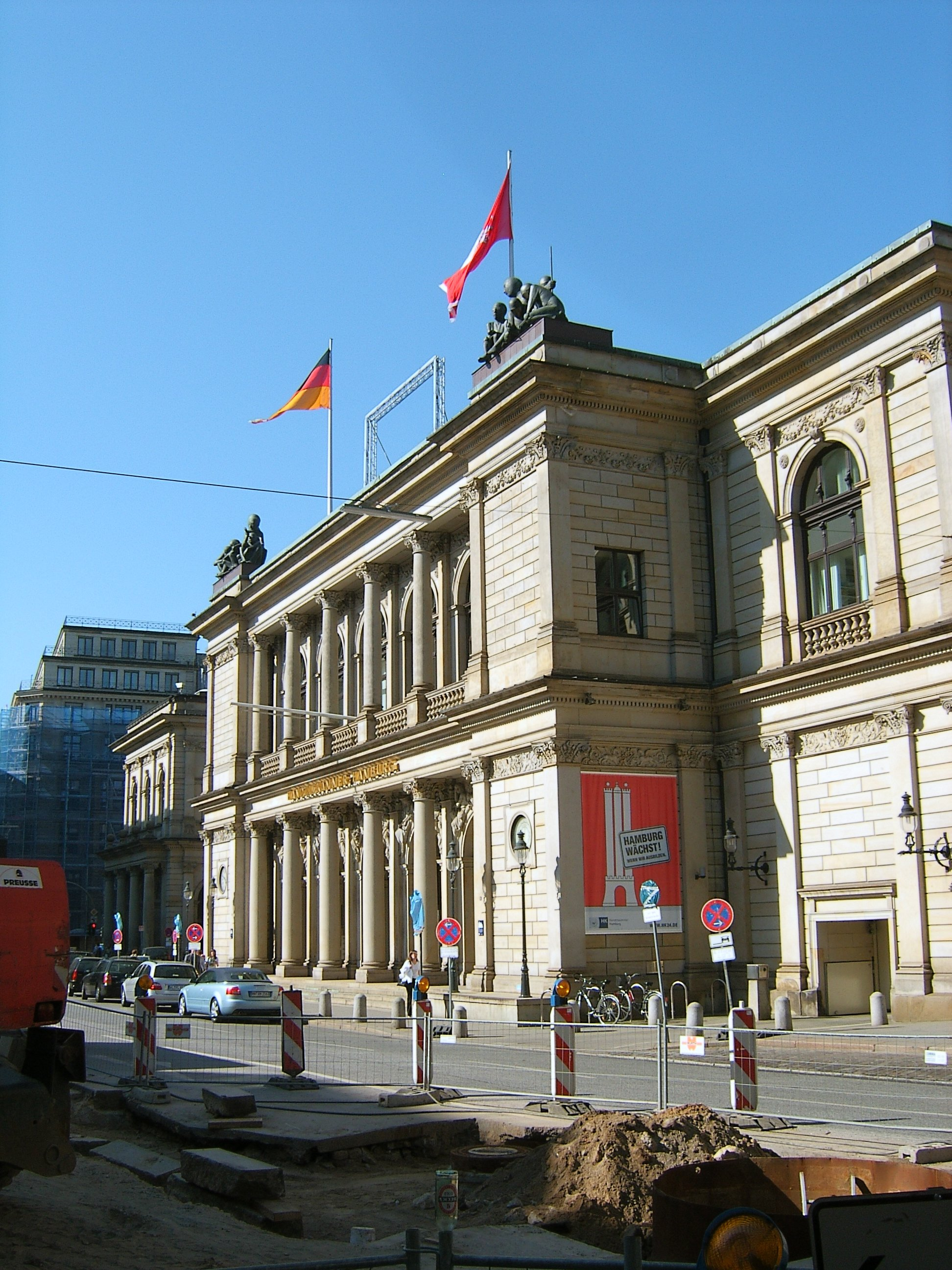 Die Hamburger Börse mit der Handelskammer in Hamburg-Altstadt überstand den Großen Brand von 1842. Sie wurde von 1839 bis 1841 nach Plänen von Carl Ludwig Wimmel und Franz Gustav Forsmann erbaut. This is a photograph of an architectural monument.